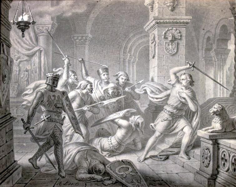 Przemysław napadnięty w Rogoźnie przez margrabiów brandenburskich (studium)